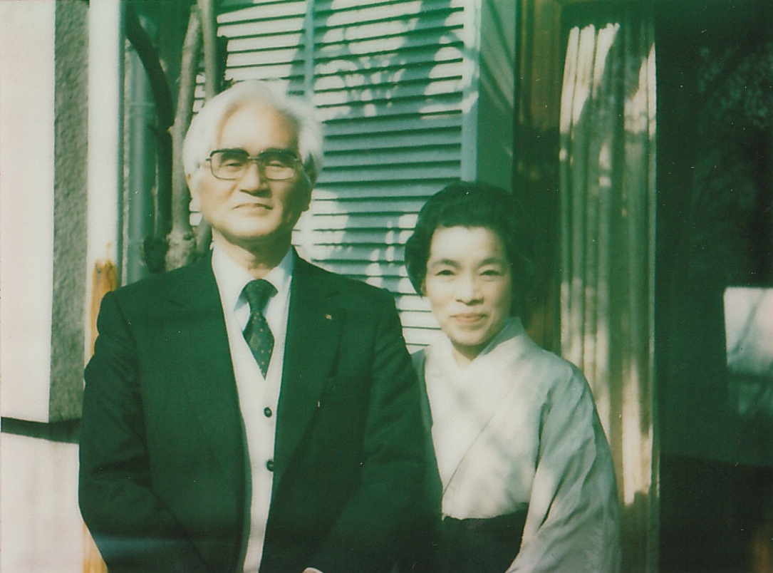 東昇60歳、ユリ子56歳。1972年10月